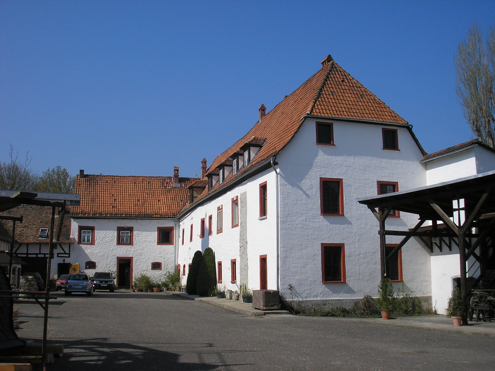 Die Gebäude der ehemaligen Wasserburg Lehesten bei Jena (Thüringen).